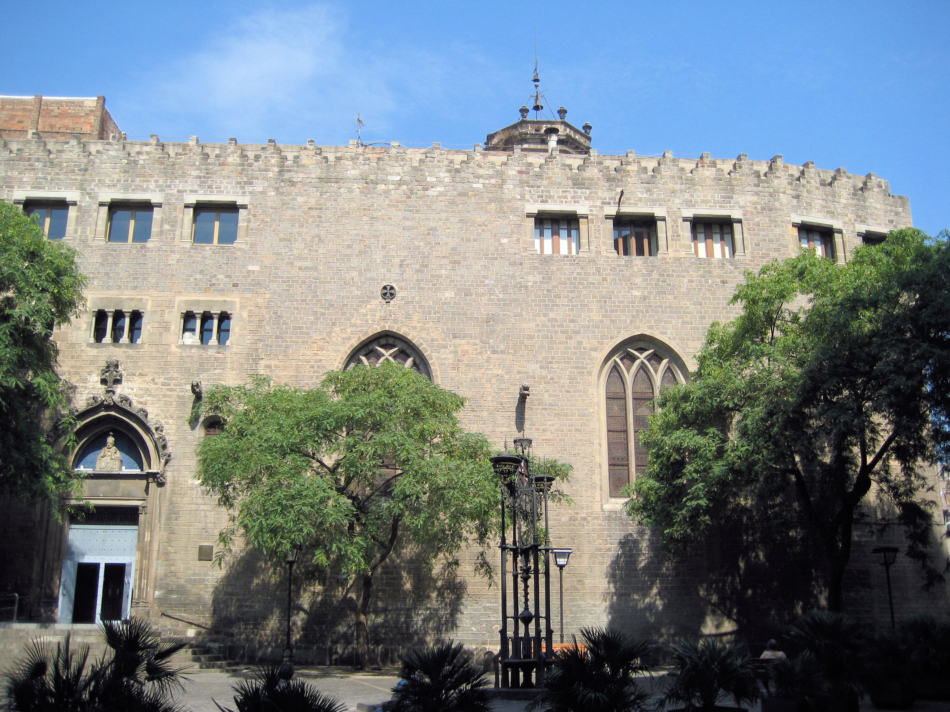 Vista frontal de l'església de Sant Pere de les Puelles a Barcelona